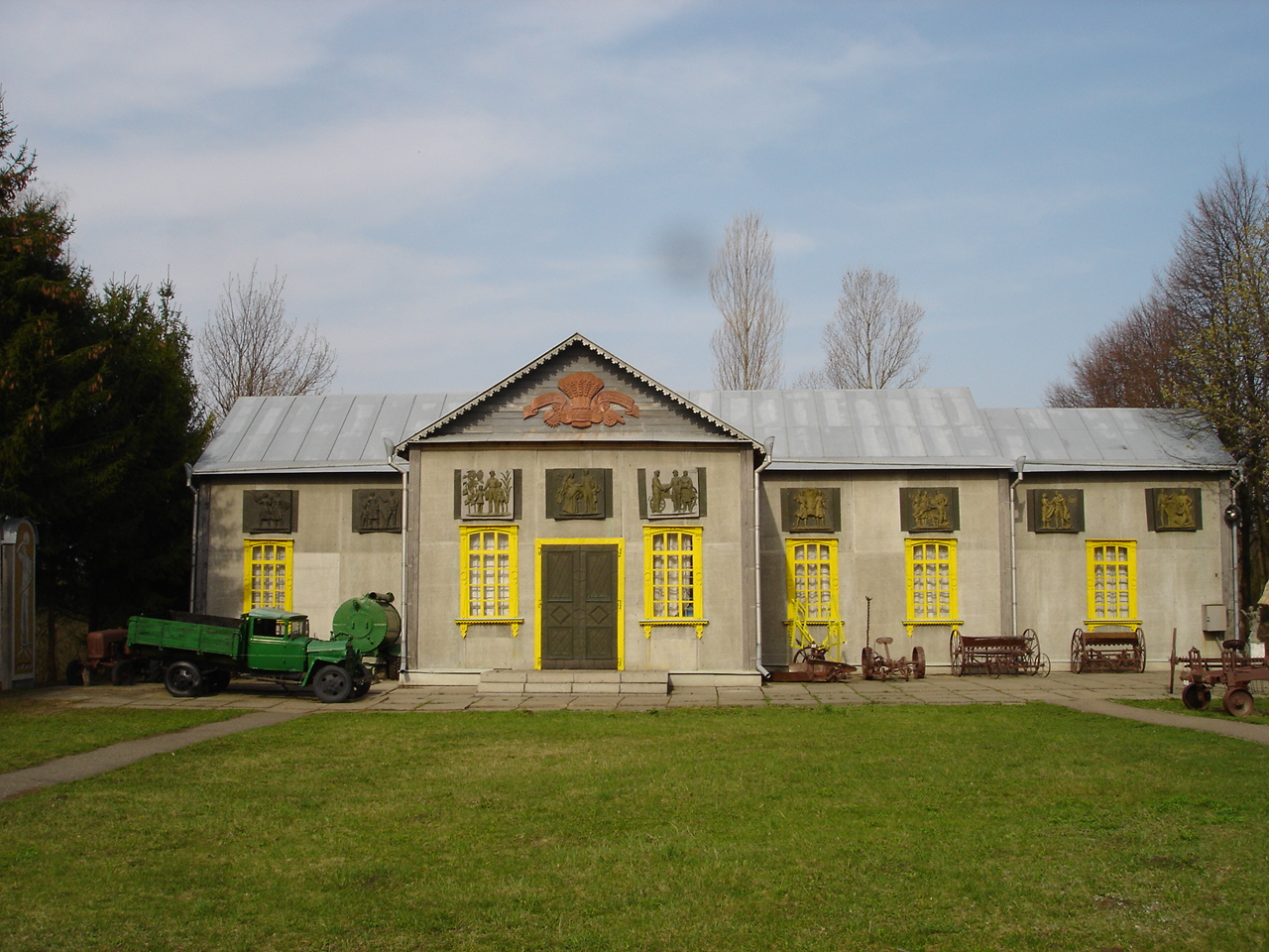 1. Музей хліба. Основний експозиційний павільйон., Музей хліба